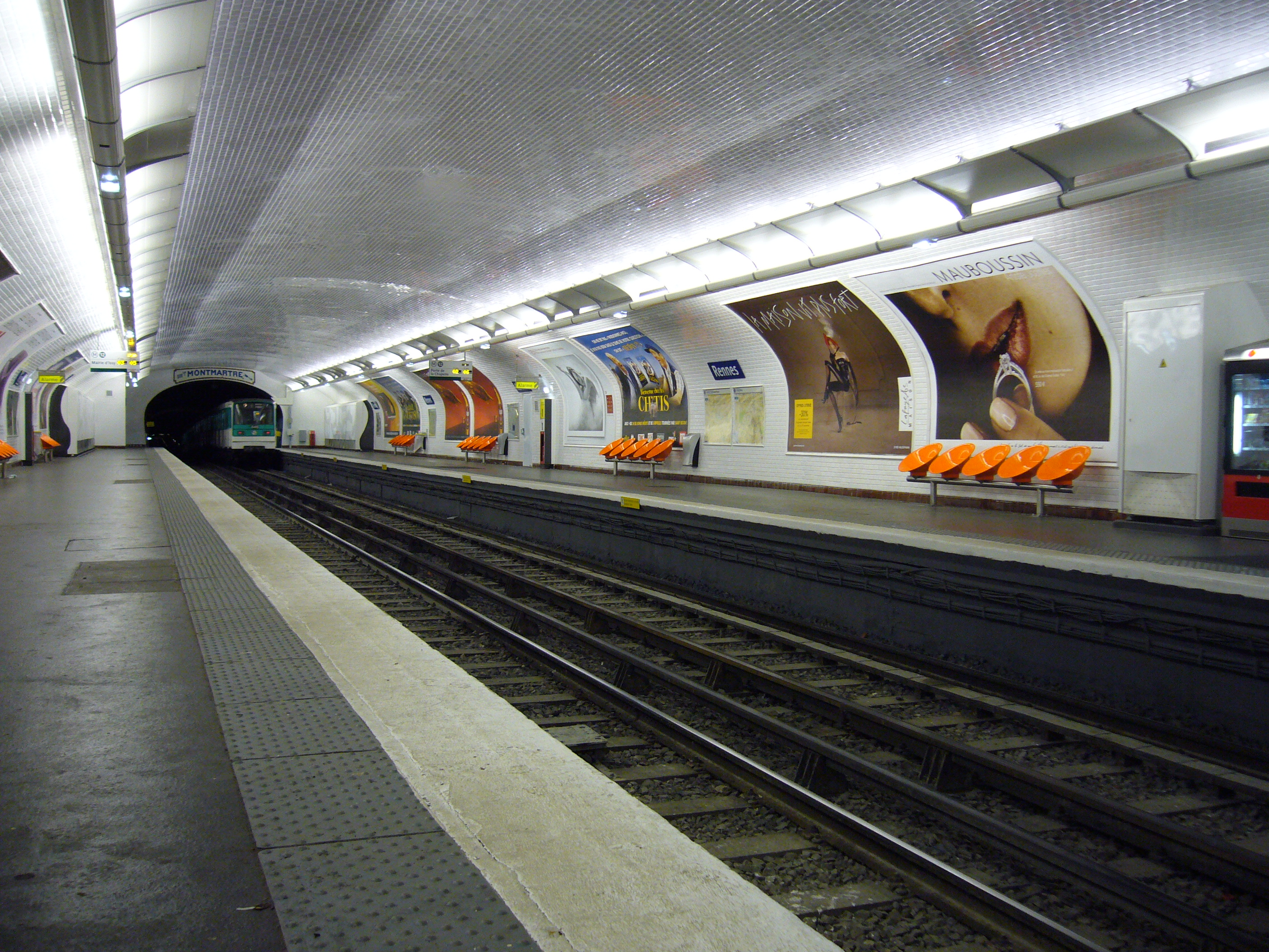 Vue des quais de la station Rennes sur la ligne 12 du métro de Paris.